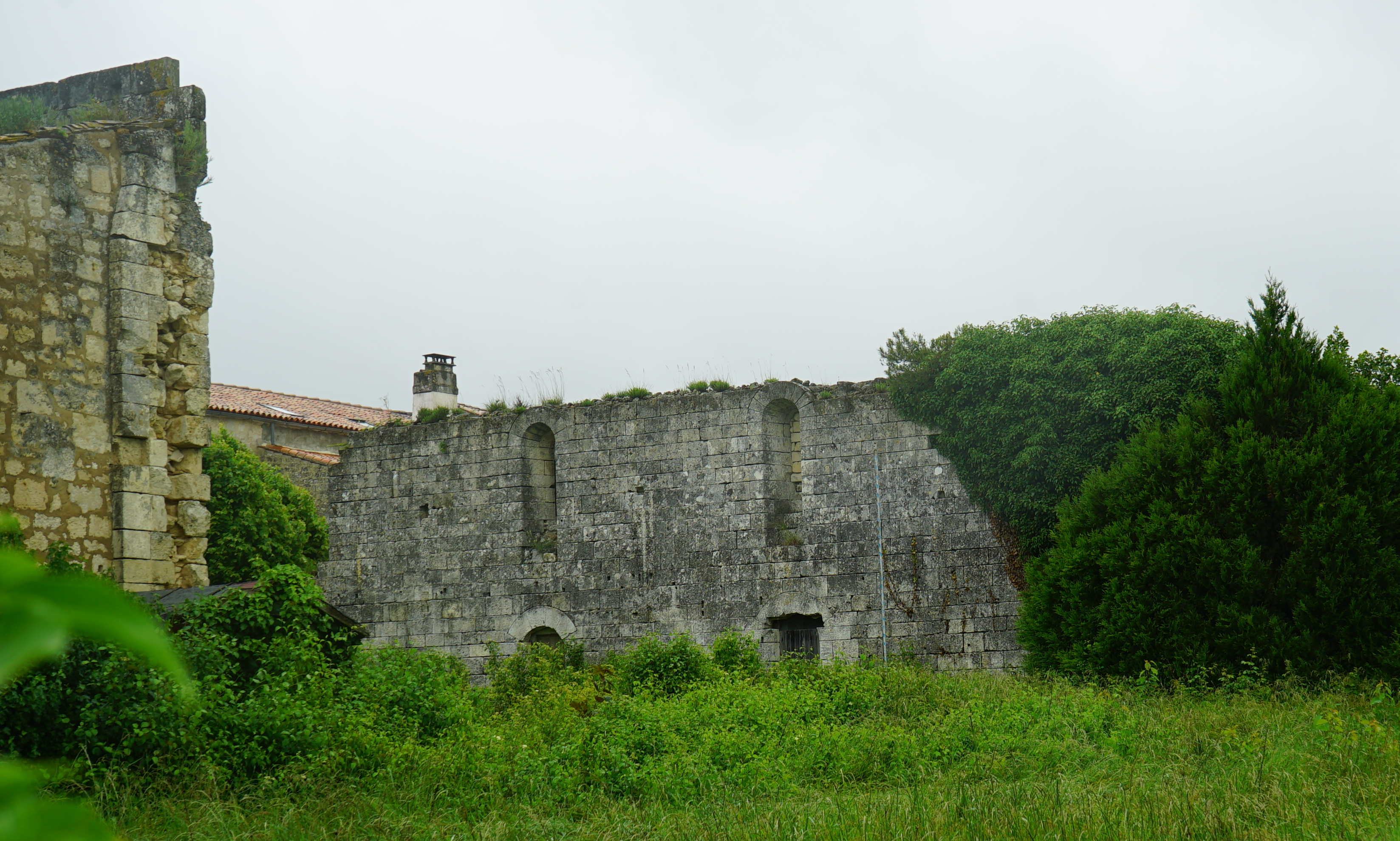 en charente maritime.